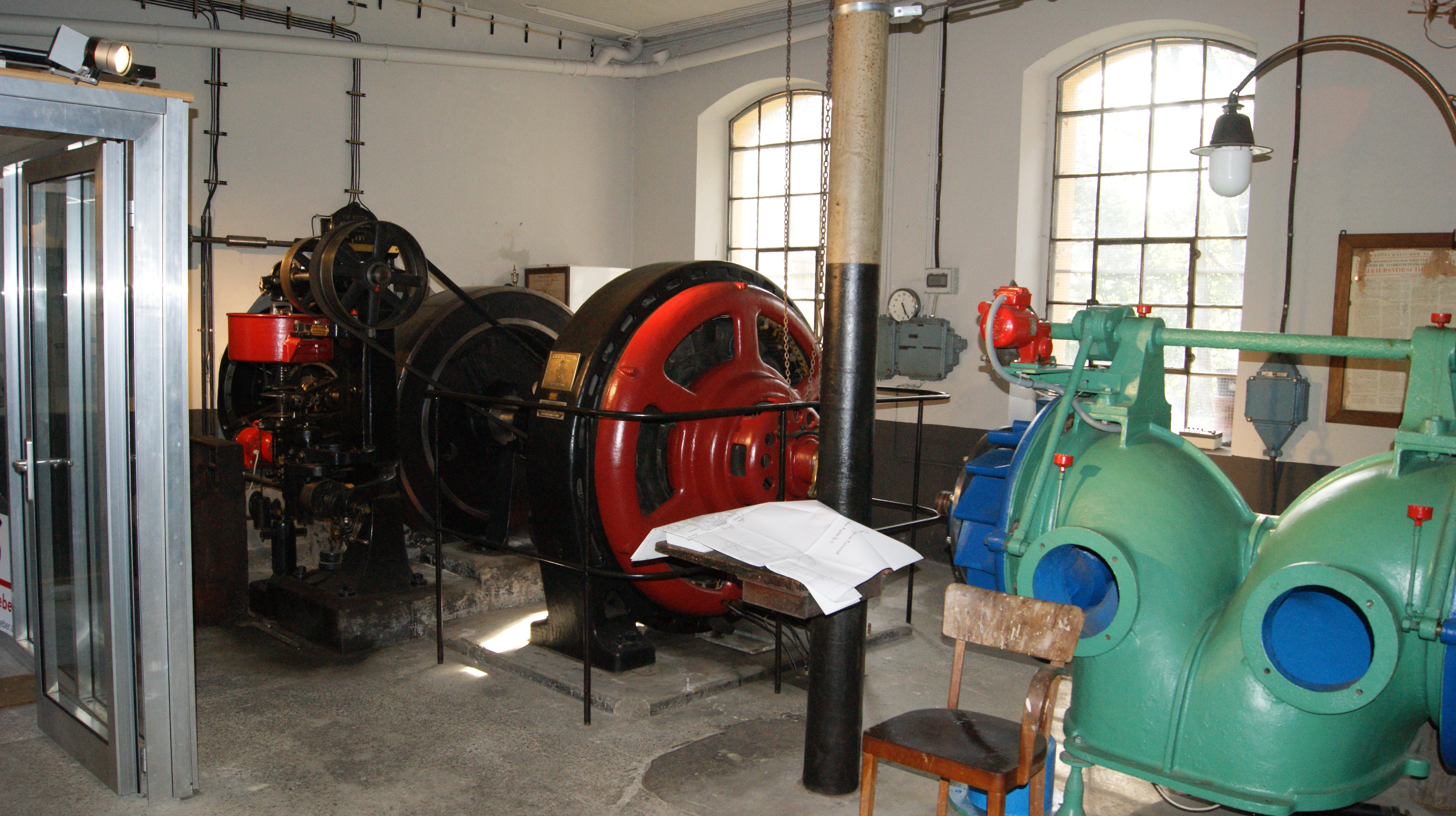 Kraftwerk Forach (Dornbirn, Vorarlberg, Österreich, Maschinengruppe.